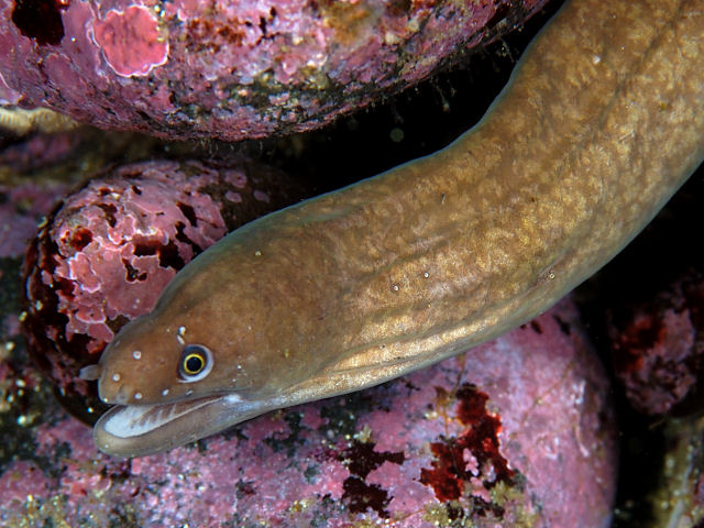 タカマユウツボ Anarchias seychellensis